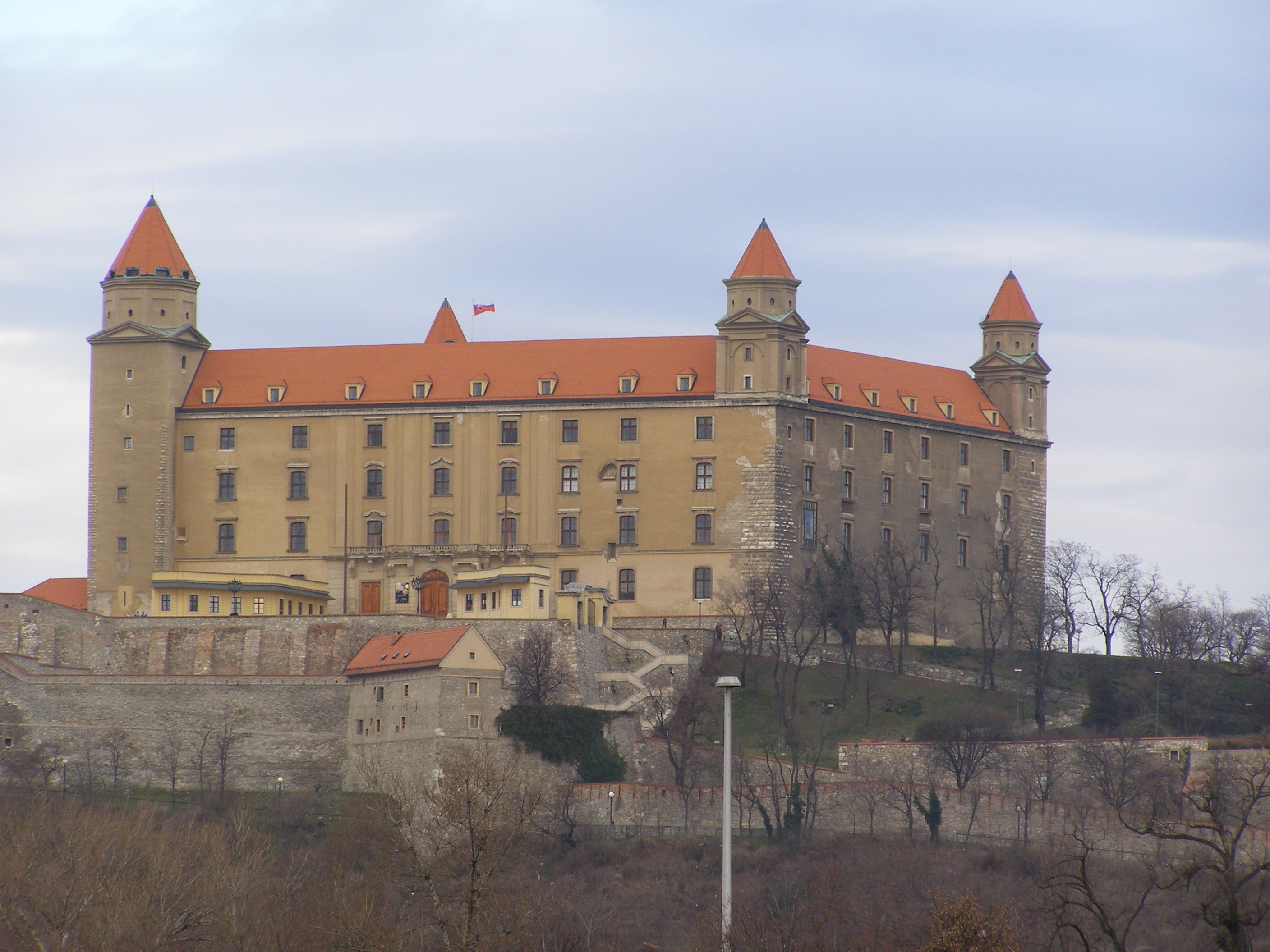 Bratislava Castle